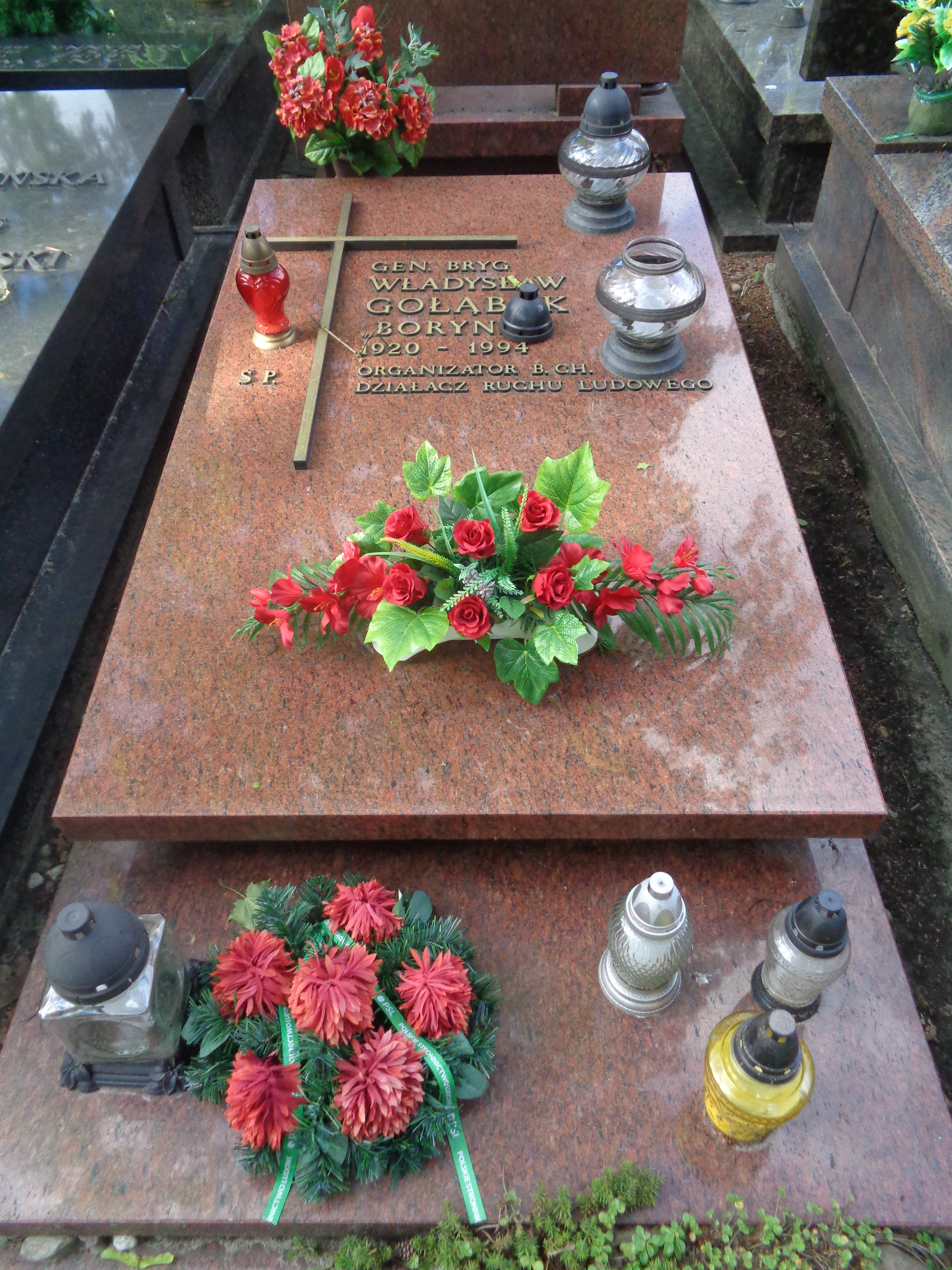 Grób Władysława Gołąbka na Cmentarzu Wojskowym na Powykach